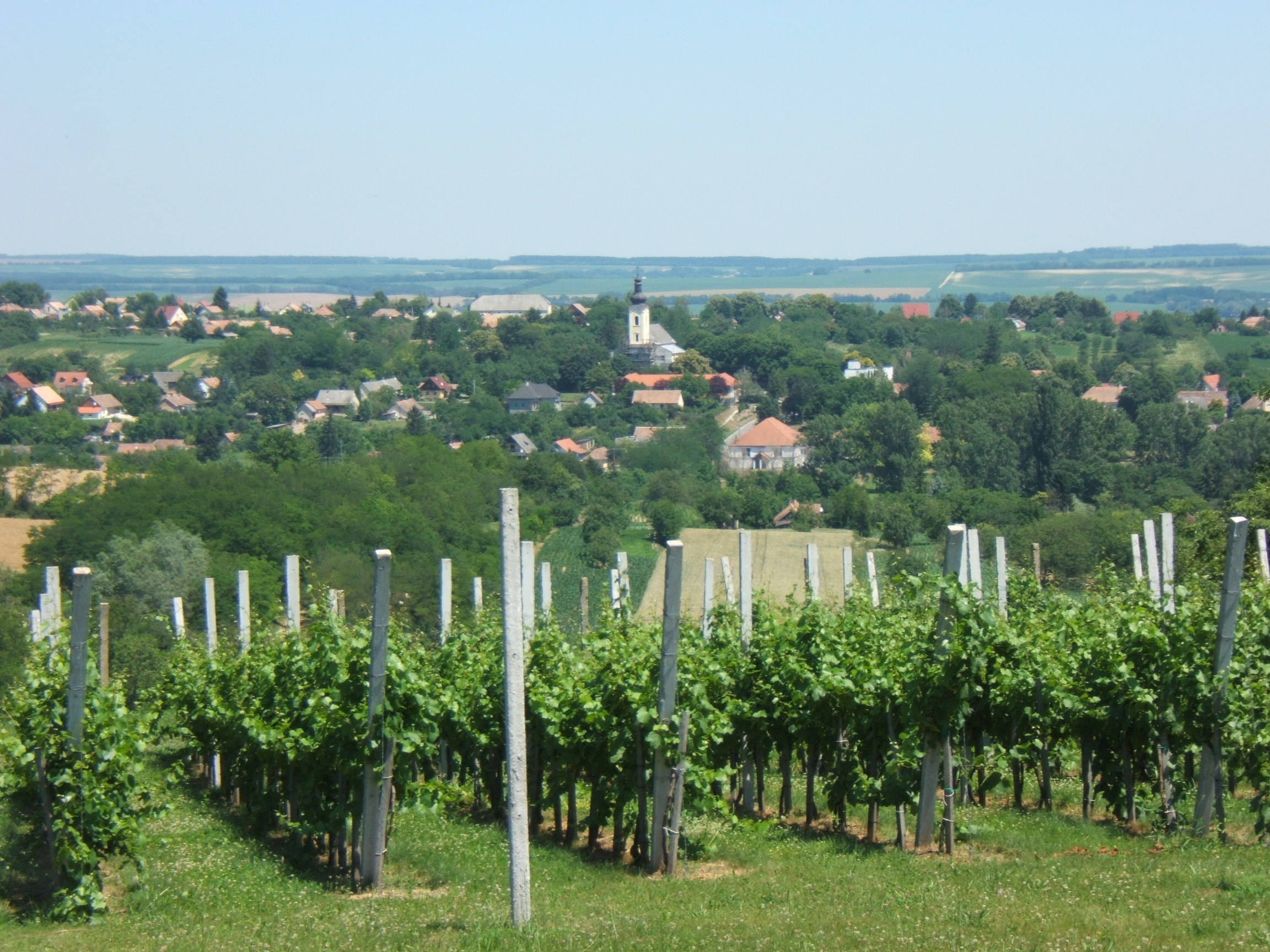 Karád látképe a szőlőhegyről